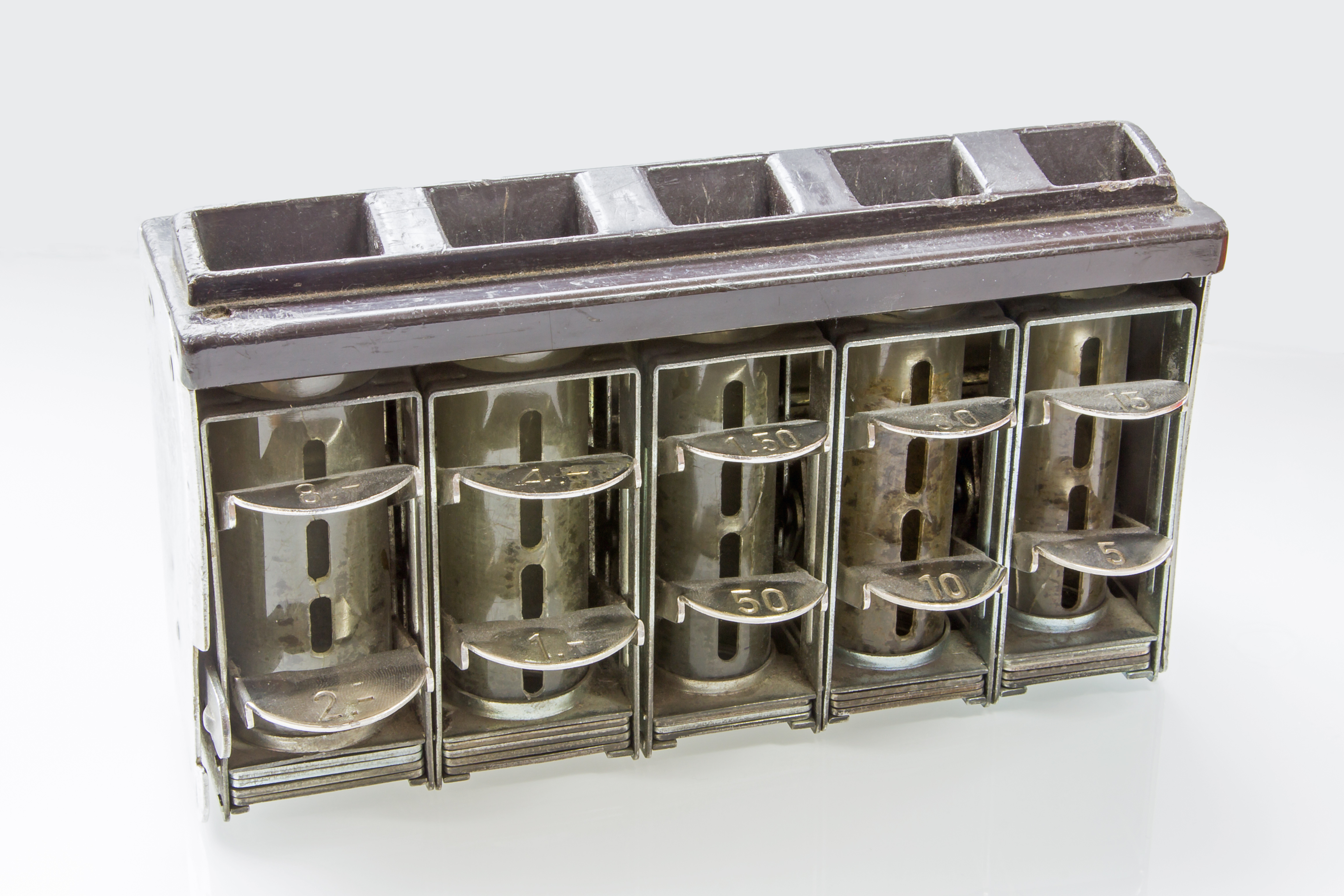 Münzbehälter aus einem Bus der Aachener Verkehrsbetriebe Modell "Professor Alfred Krauth, Eberbach/Baden"